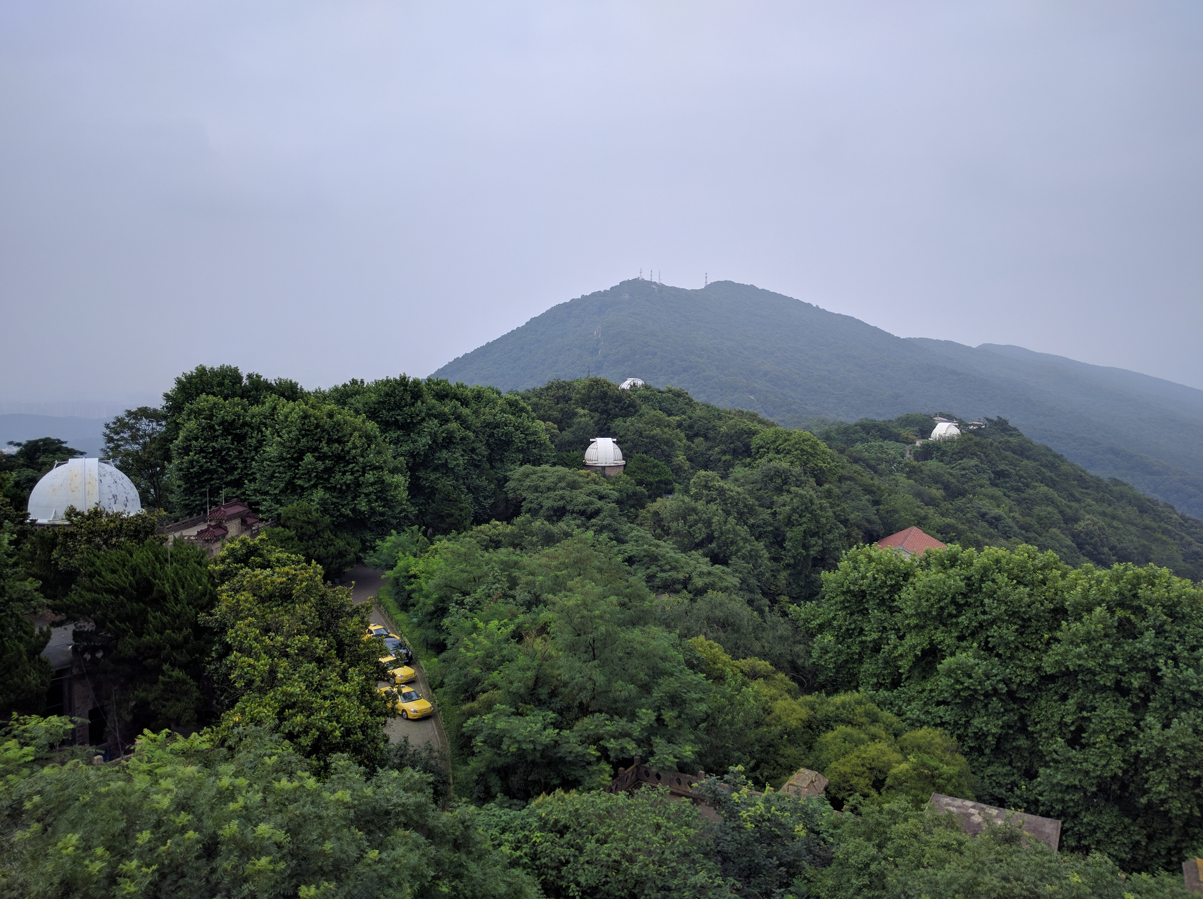 中文（中国大陆）: 南京紫金山天文台